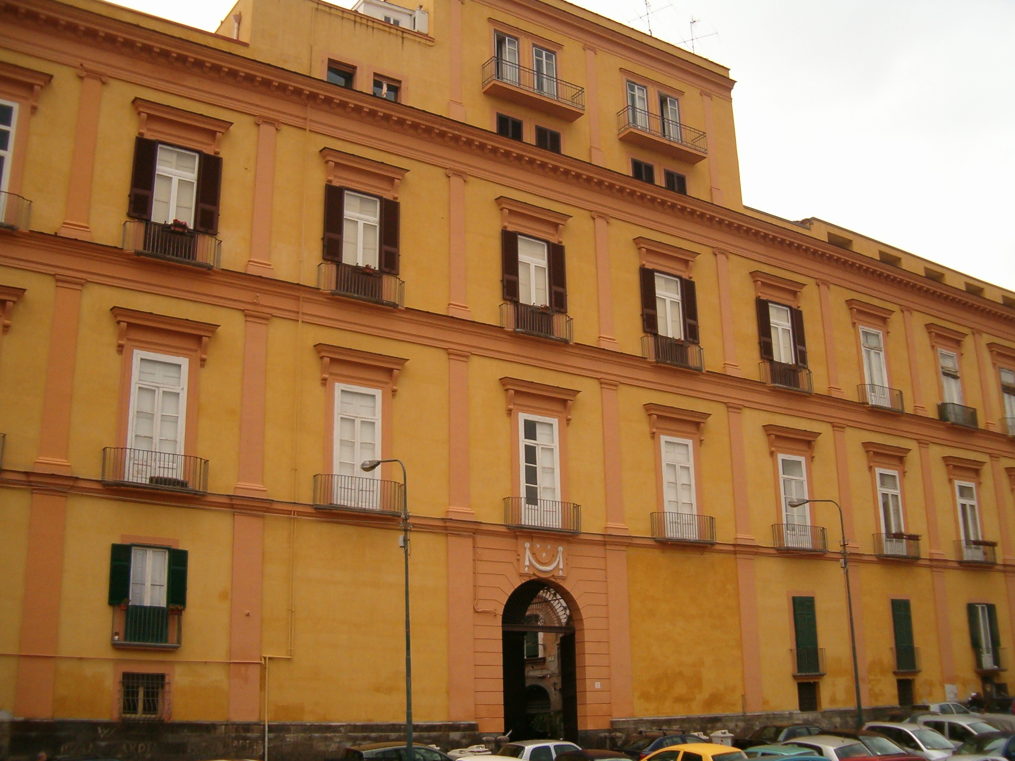 Napoli, Palazzo Spinelli di Tarsia. Facciata principale su Largo Tarsia.